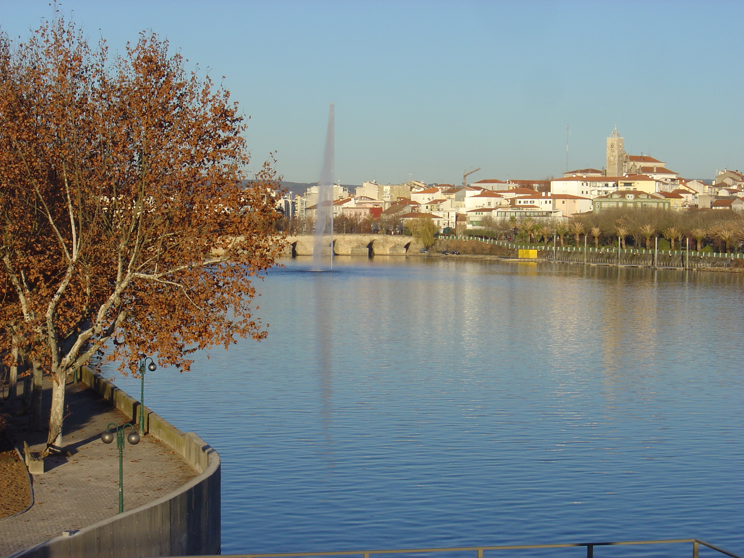 Mirandela, Portugal